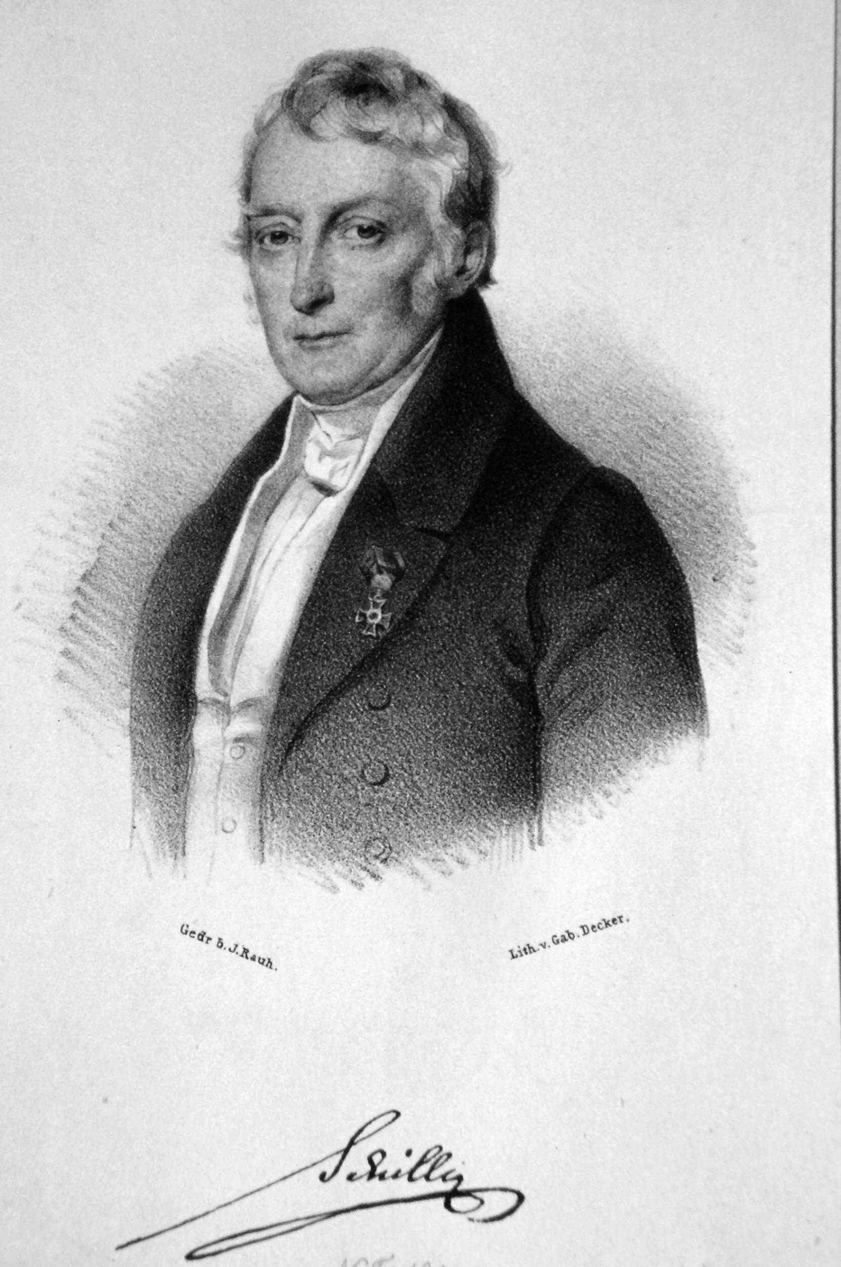 Franz Ferdinand von Schiller (1773-1861), Montanist, Beamter Lithographie von Gabriel Decker, um 1840